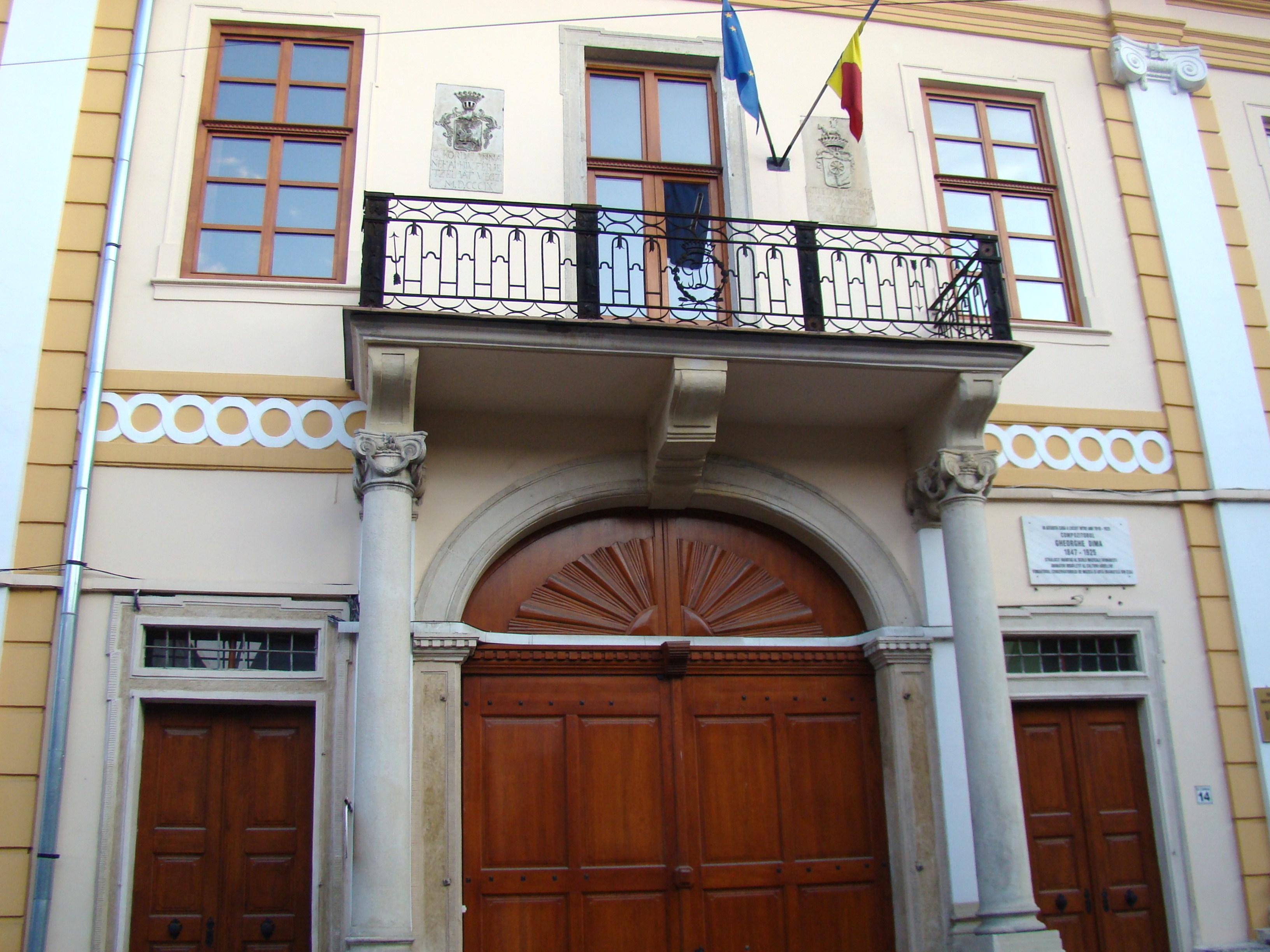 Casa în care a locuit Gheorghe Dima